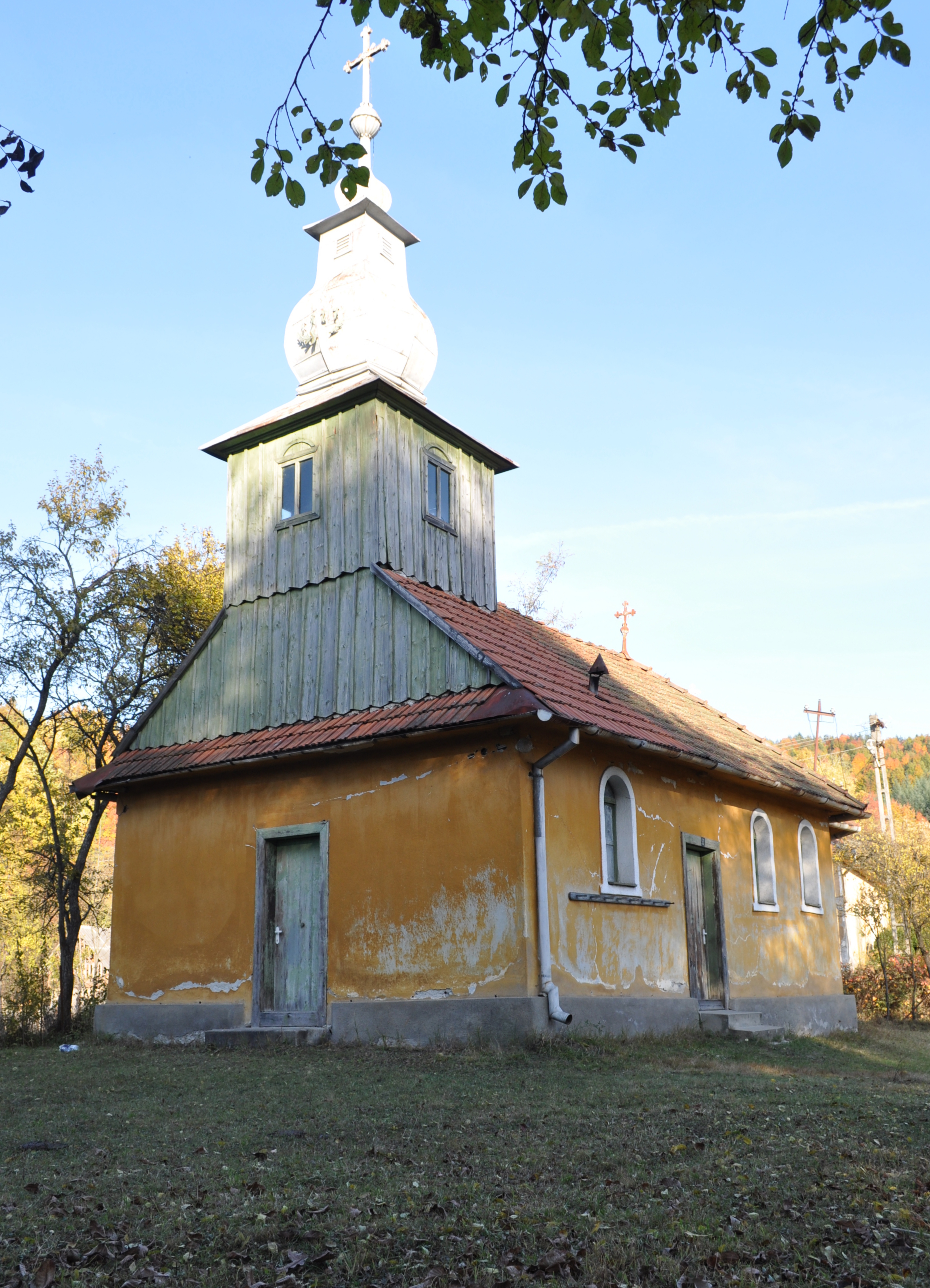 Biserica de lemn "Înălţarea Domnului" din Groși, județul Arad